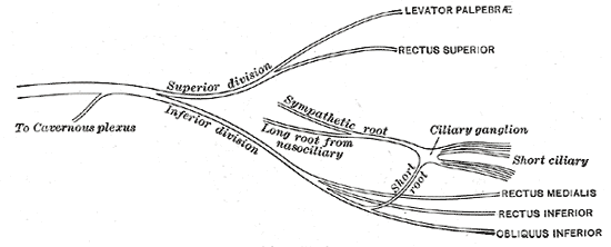 N. oculomotorius